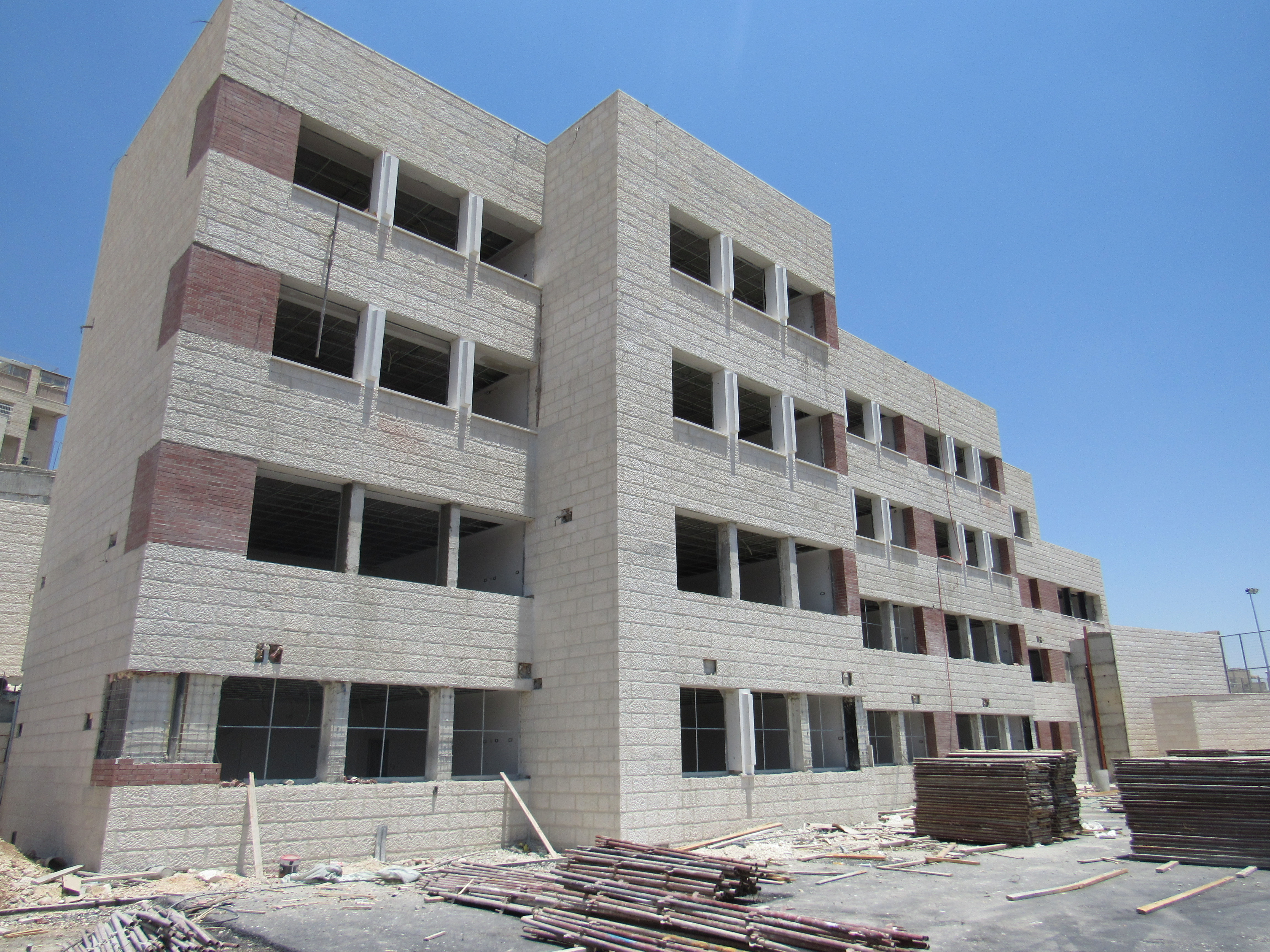 מבנה התלמוד תורה ובית הספר המוקם בימים אלו